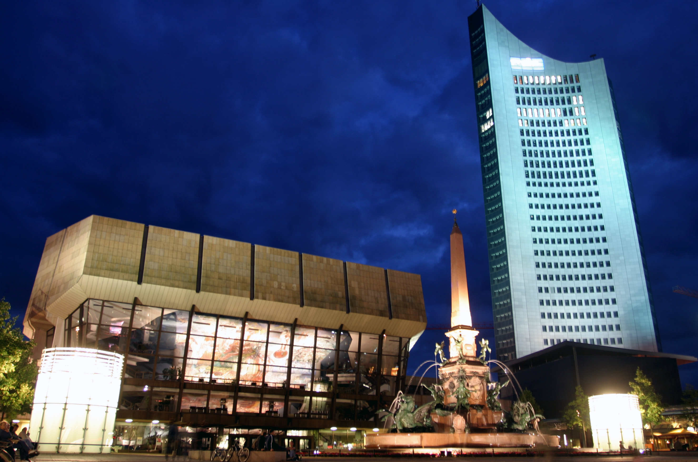 Leipzig - Augustusplatz mit Gewandhaus, Mendebrunnen und Cityhochhaus zur blauen Stunde - Foto: Christian Suhrbier